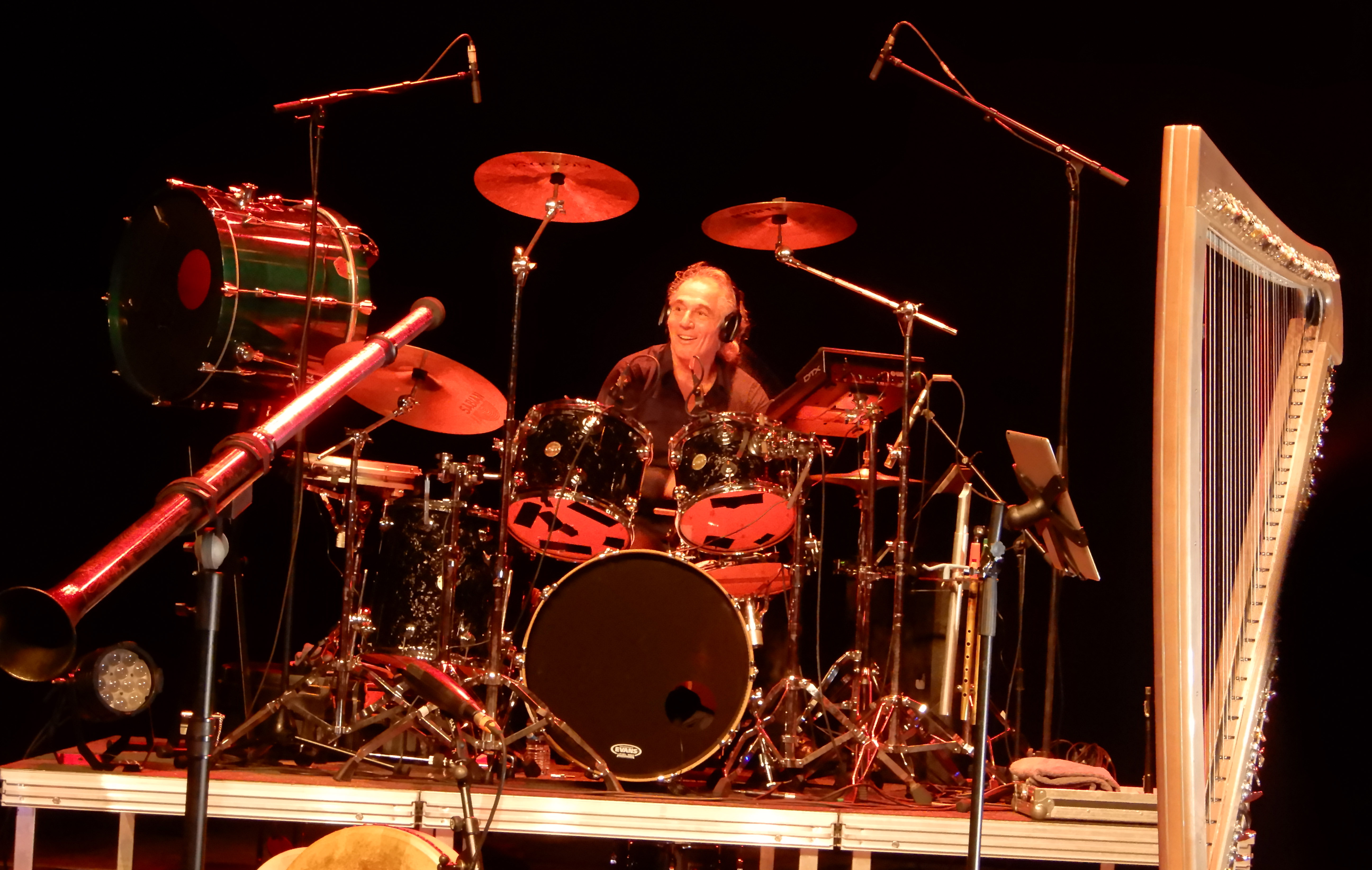 Marc « Marc de Ponkallec » Hazon lors du concert d'Alan Stivell à Roye le 7 décembre 2018